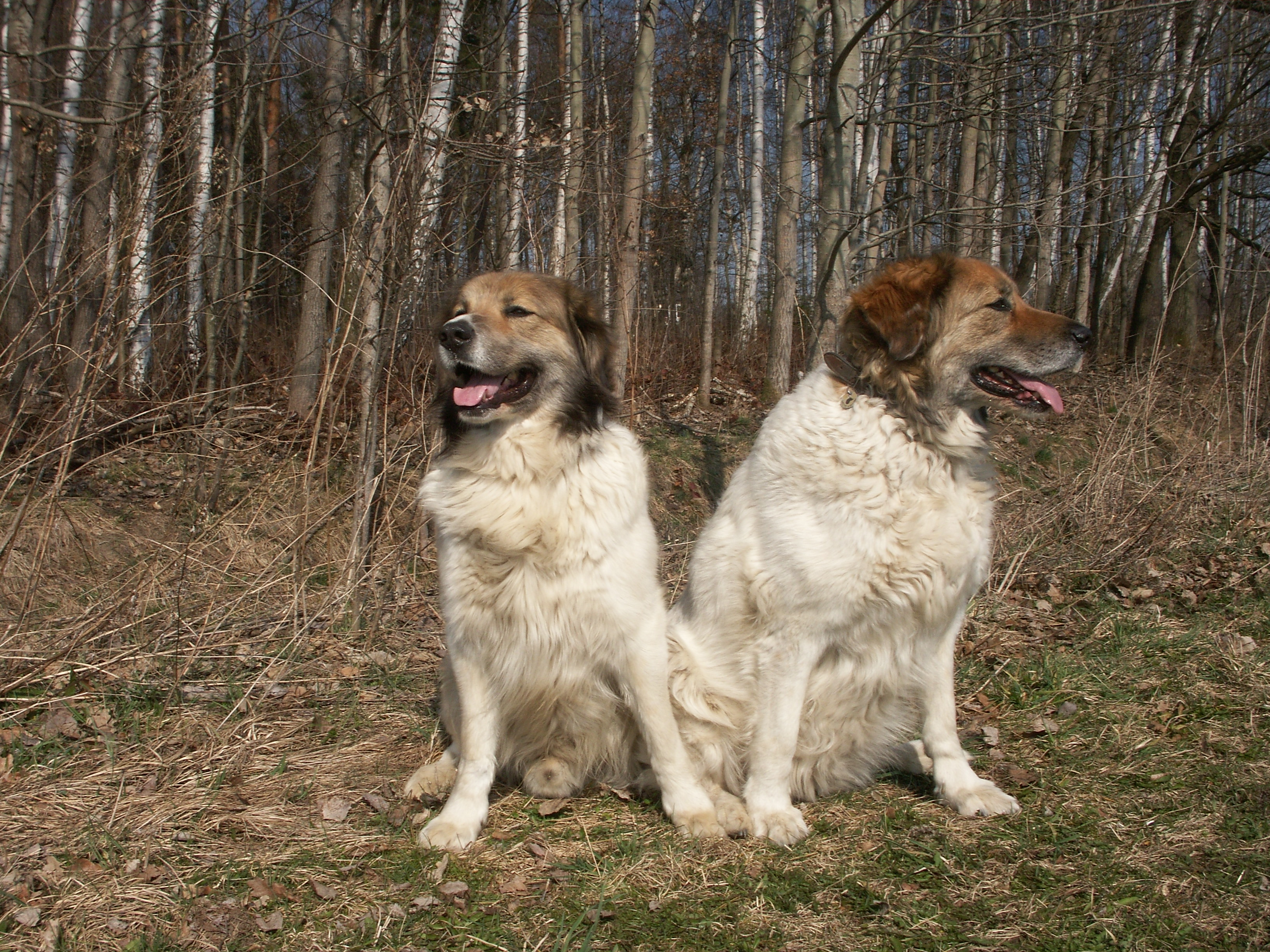 Pes a fena CHP